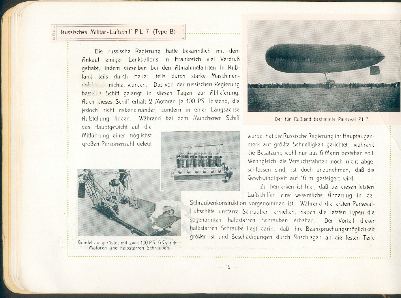 Parseval-Luftschiff PL 7